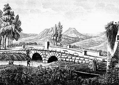 37 - VEDUTA DI TOR TRE PONTI OSSIA PONTE ANTICO DI TRAJANO